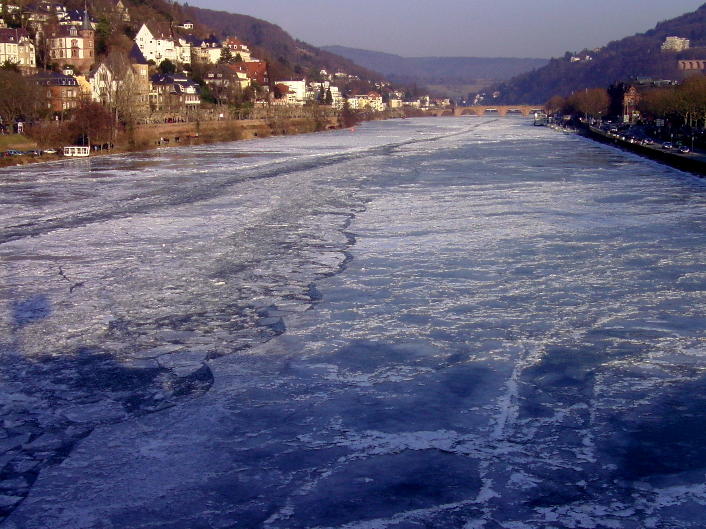 Heidelberg, der Neckar zugefroren, das Neuenheimer Ufer, Alte Brücke und die Heidelberger Altstadt